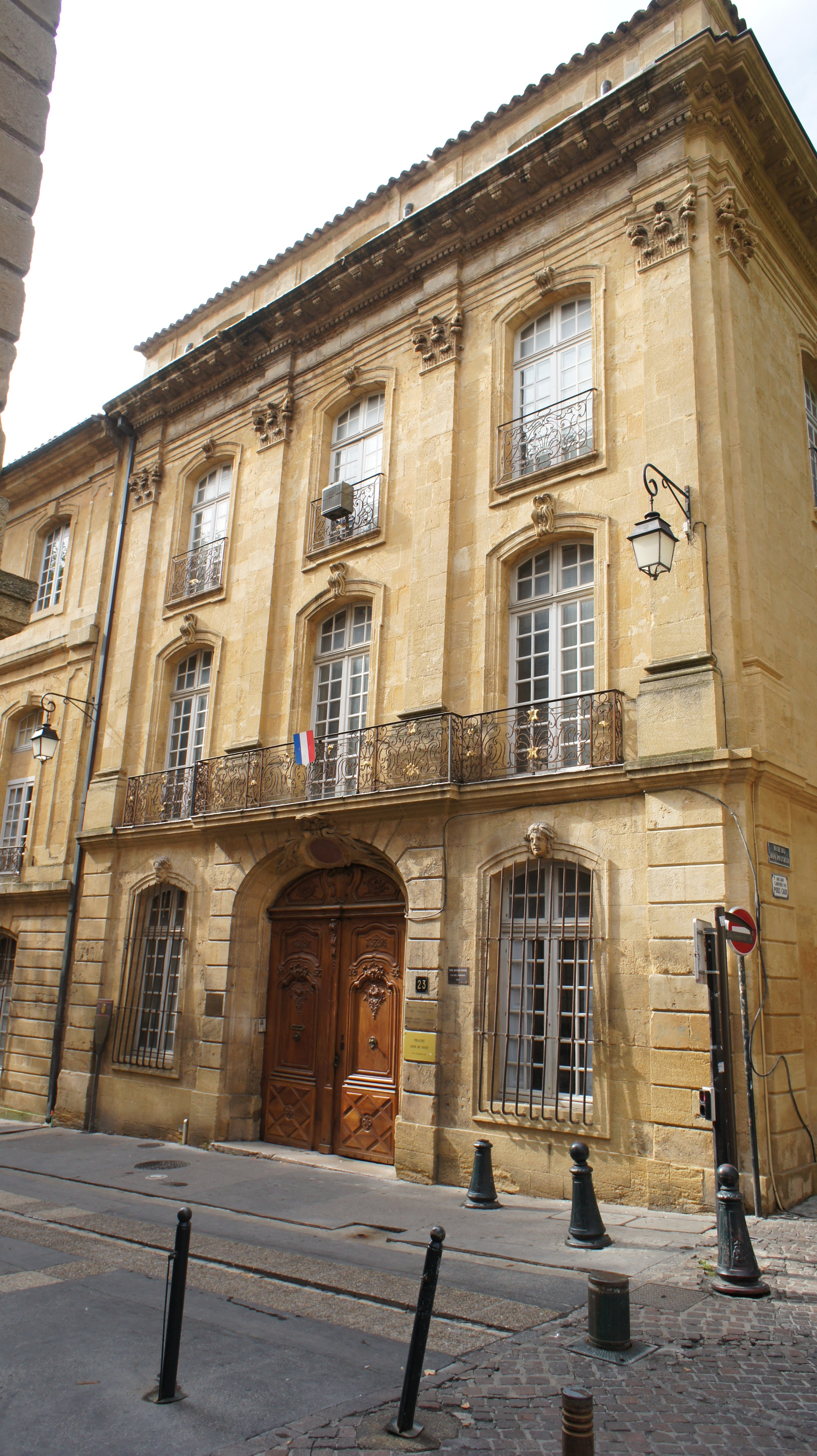 This building is en partie classé, en partie inscrit au titre des Monuments Historiques. .